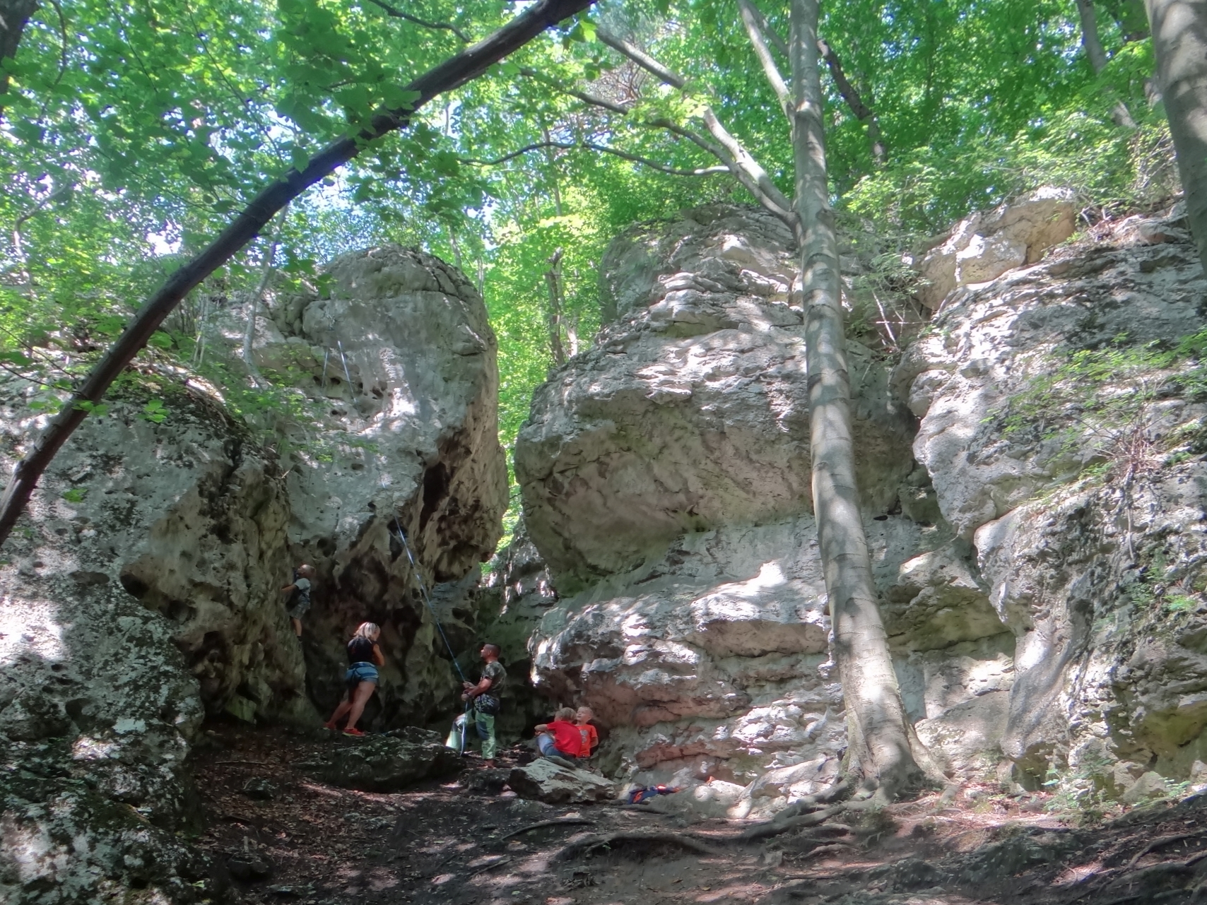 Skała Diabelski Mosty w Złotym Potoku